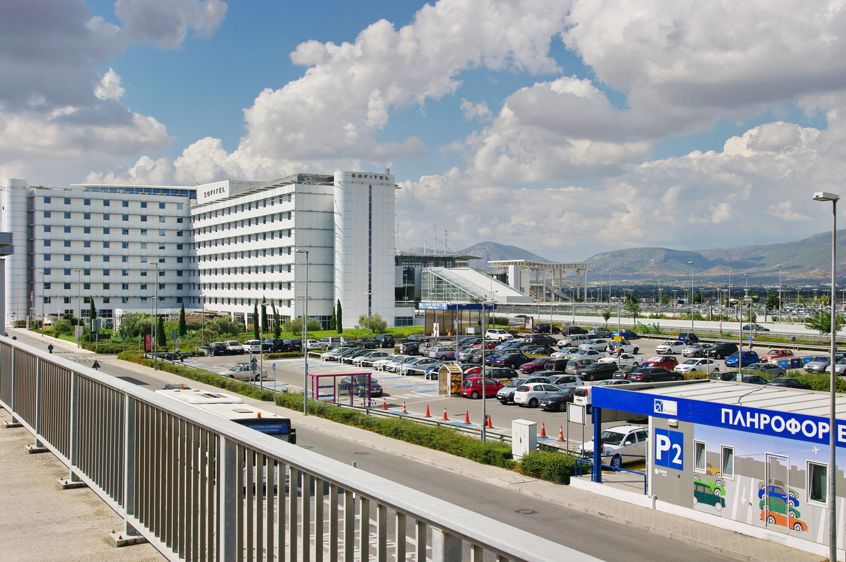 Langzeitparkplatz und Hotel Sofitel